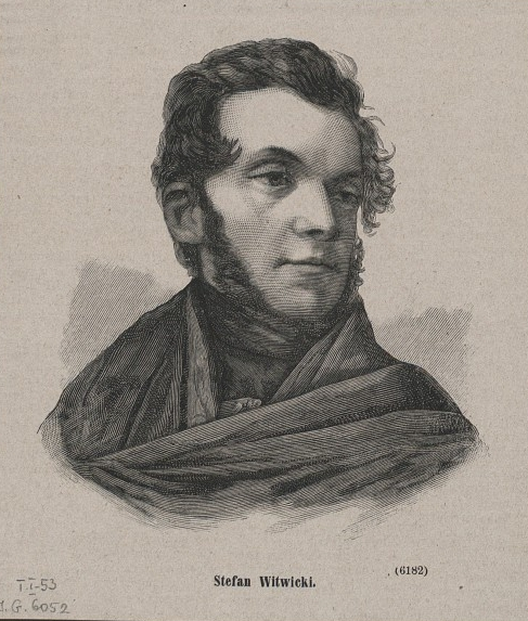 Stefan Witwicki, portret, ok. 1831 Unknown stefan witwicki, portrait, about 1831